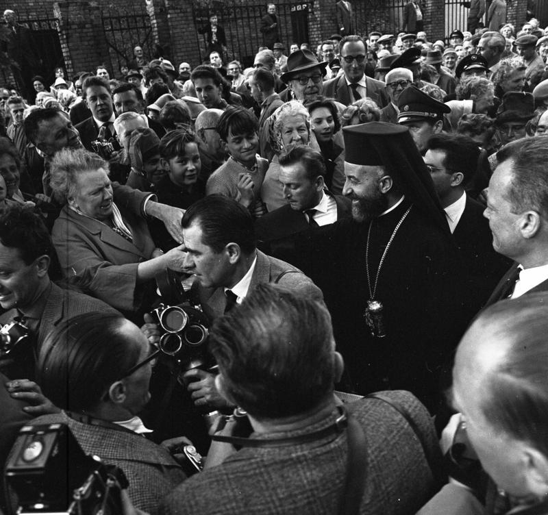 Staatsbesuch Zypern West-Berlin Stadtrundfahrt, Bernauerstr.